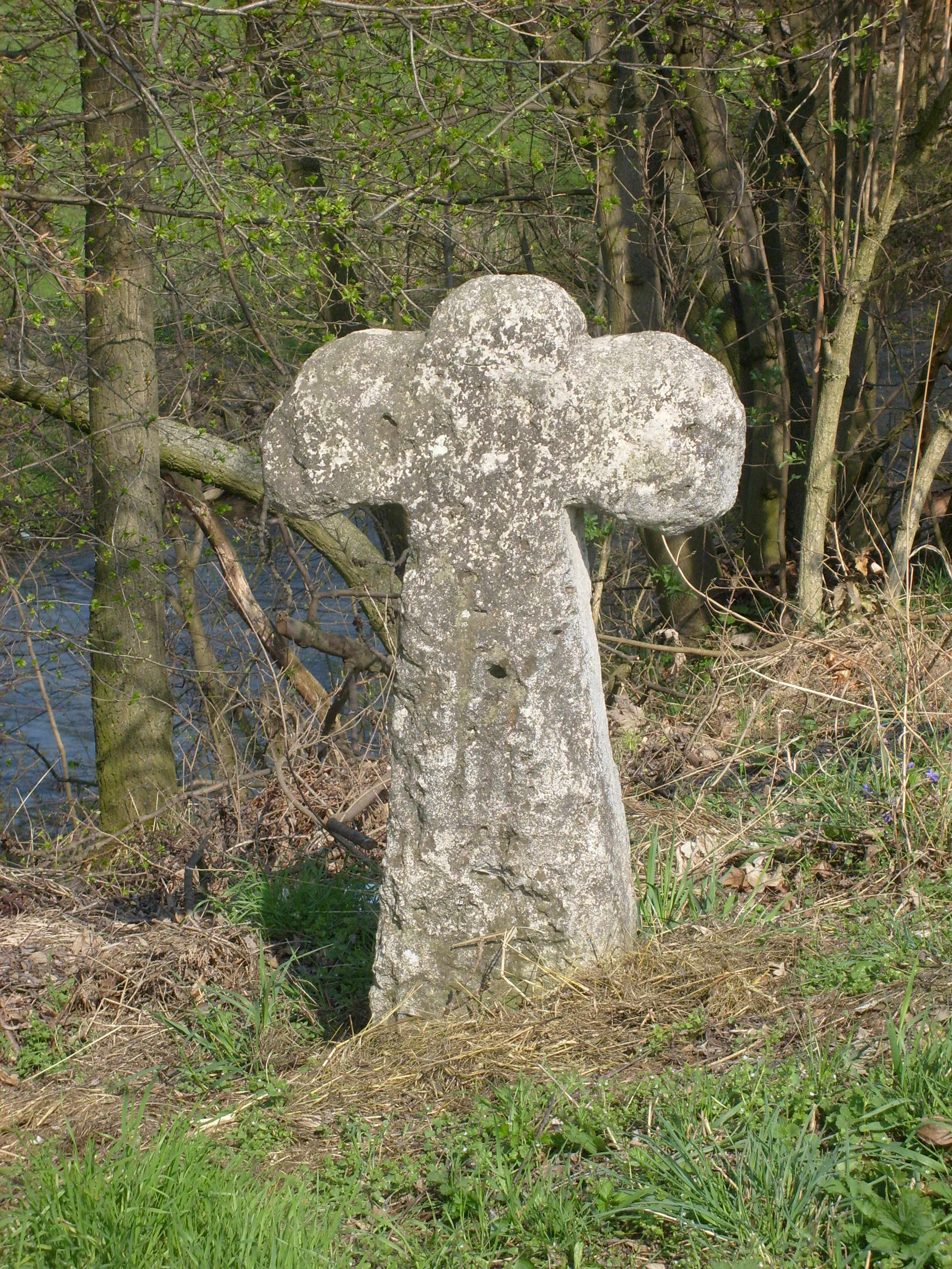 Hexenkreuz Zottelstedt